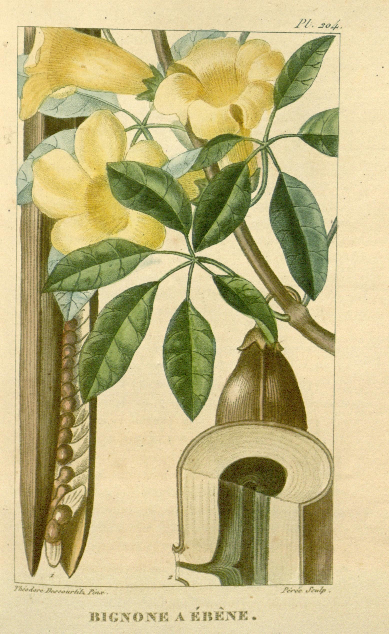 yv. ^^oj. Il I G XO JVK A K Ill-LXK .